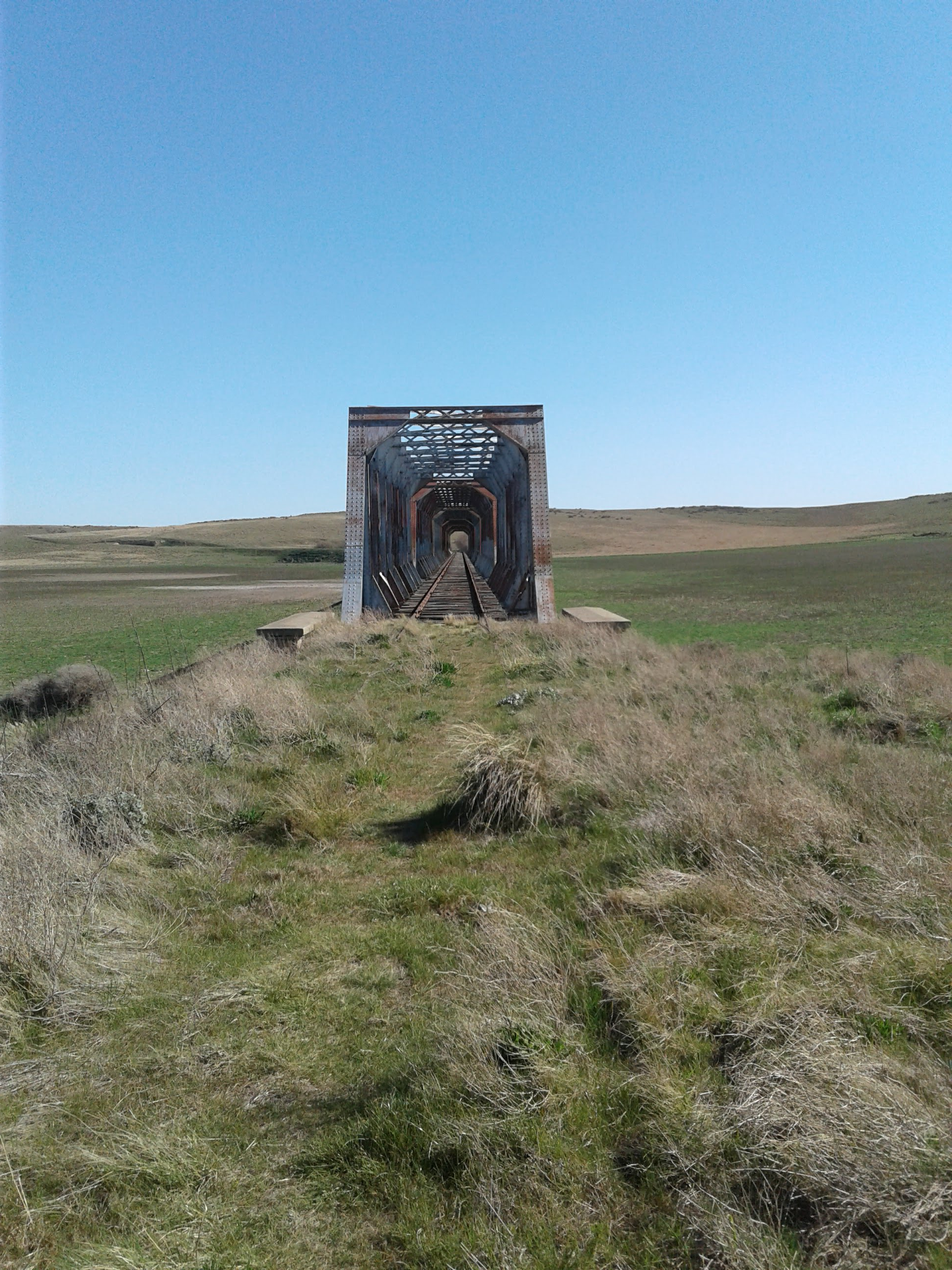 Centenario puente de casi 300 metros sobre el rio Sauce Grande en la Provincia de Buenos Aires